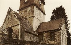 Eglise de Voyennes avant les destructions de la première guerre mondiale.